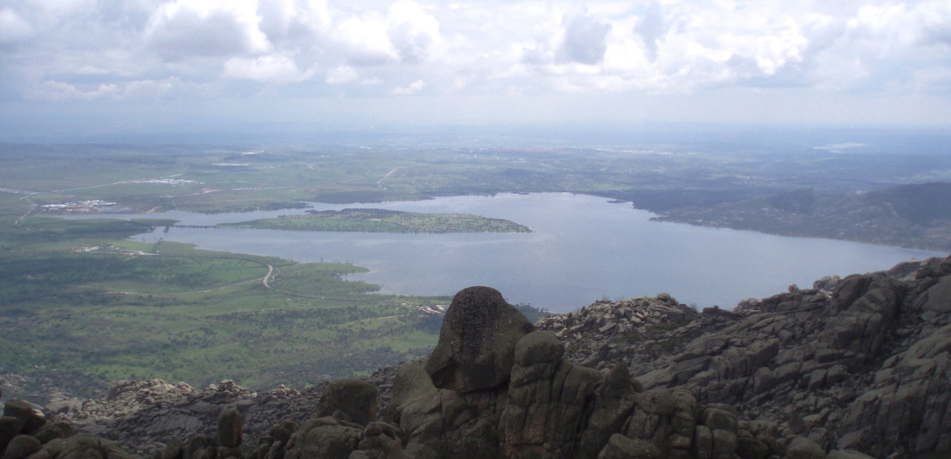 Embalse de Santillana visto desde La Pedriza (Comunidad de Madrid, España).